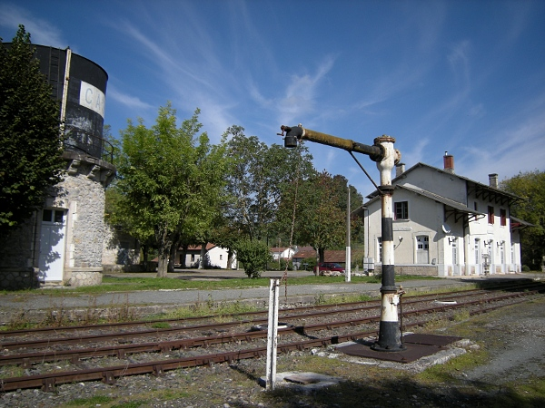 Une grue à eau à la Gare de Cajarc (Lot, Midi-Pyrénées, France).